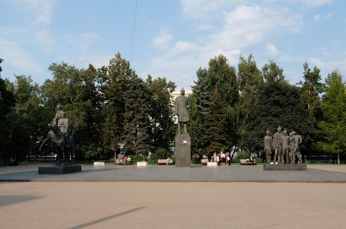 Памятник А.А.Фадееву: Миусская пл., Тверской, Центральный округ, Москва